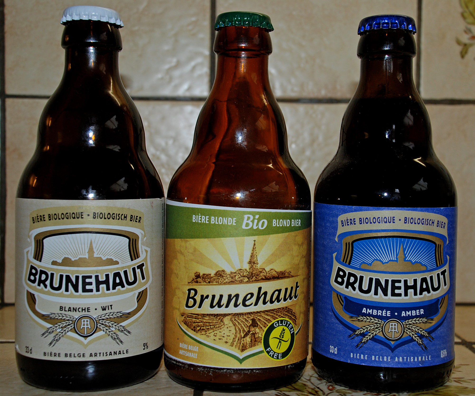 Belgisch biobier